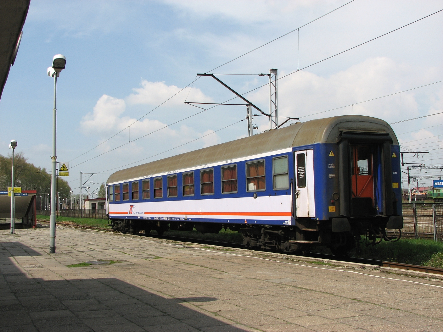 Kuszetka na stacji w Zebrzydowicach.